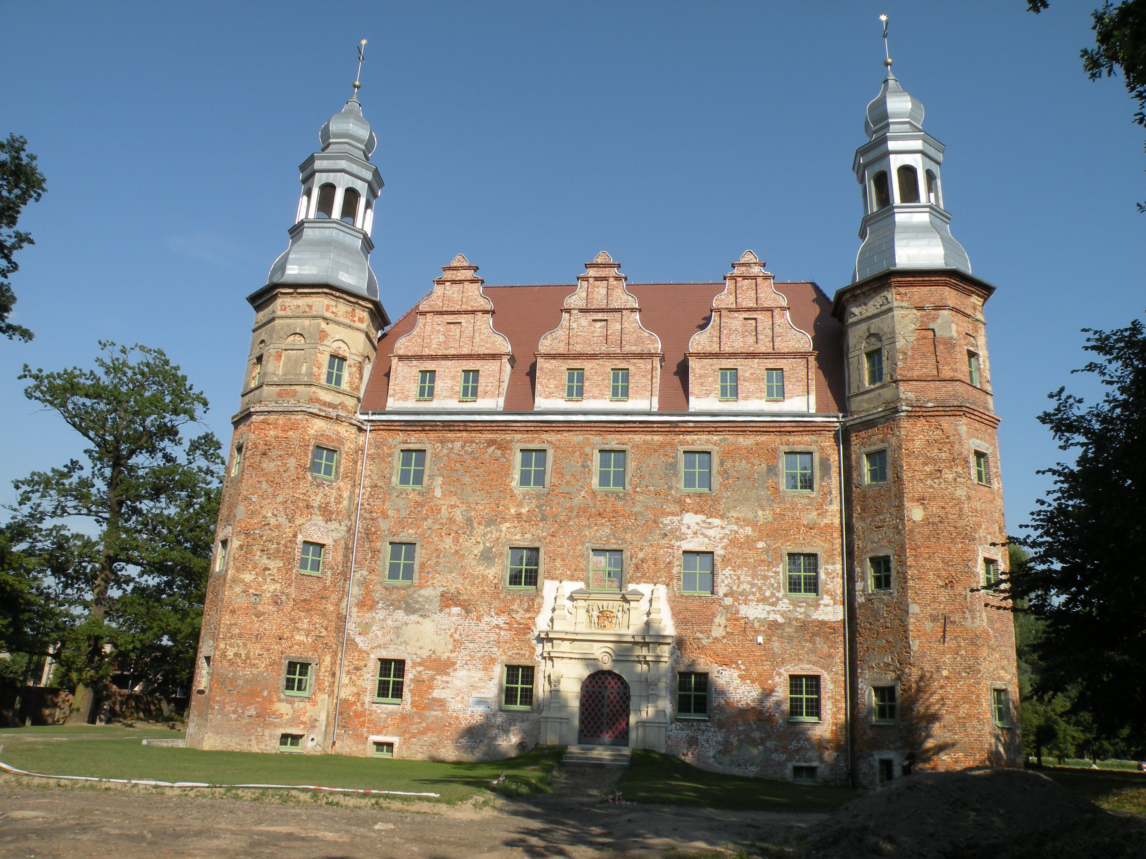 Das Schloss nach seiner Renovierung im Jahre 2015